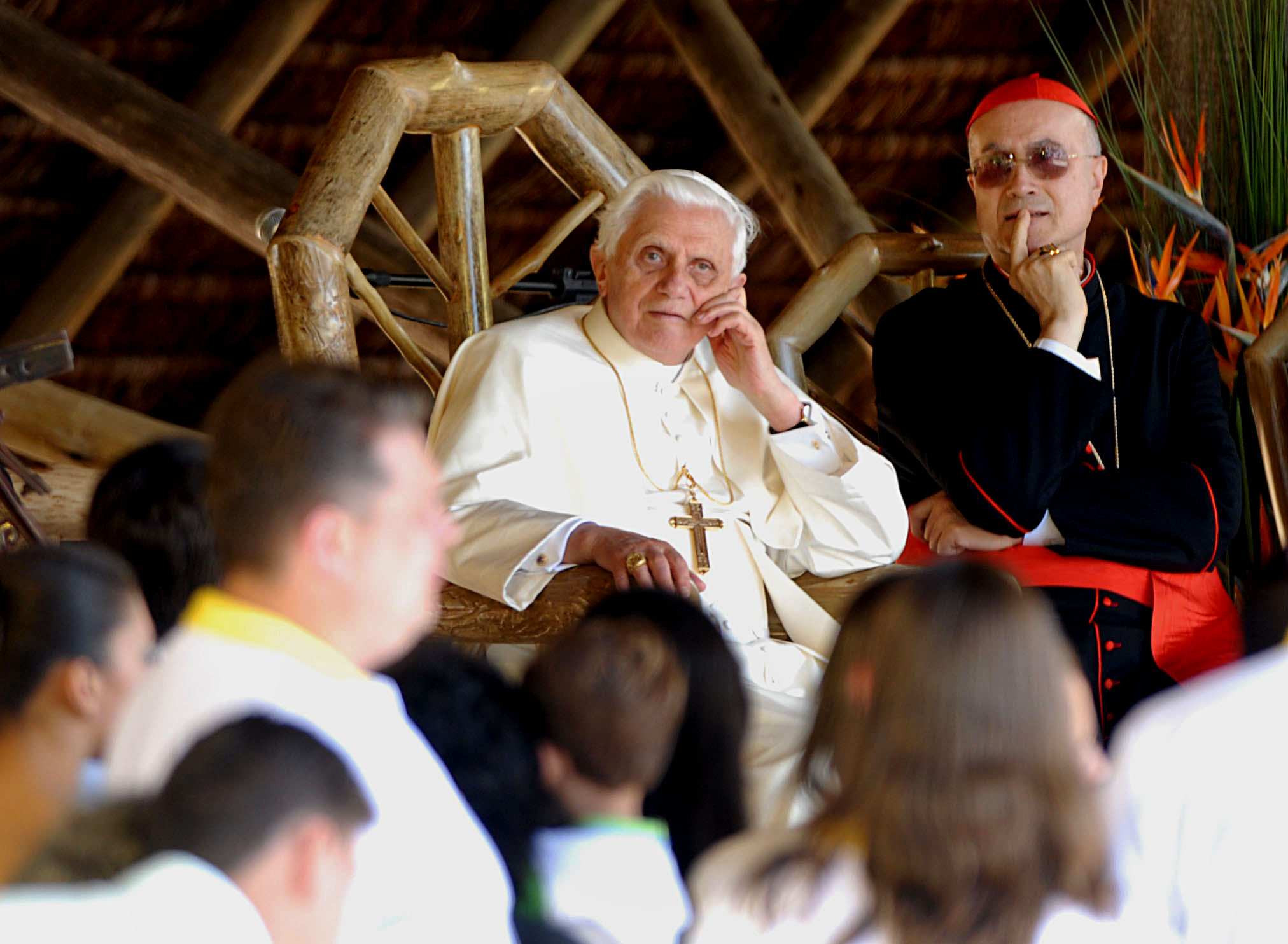 Papa Bento XVI visita a "Fazenda Esperança", local de recuperação de dependentes químicos localizado na zona rural de Guaratinguetá, São Paulo, Brasil.